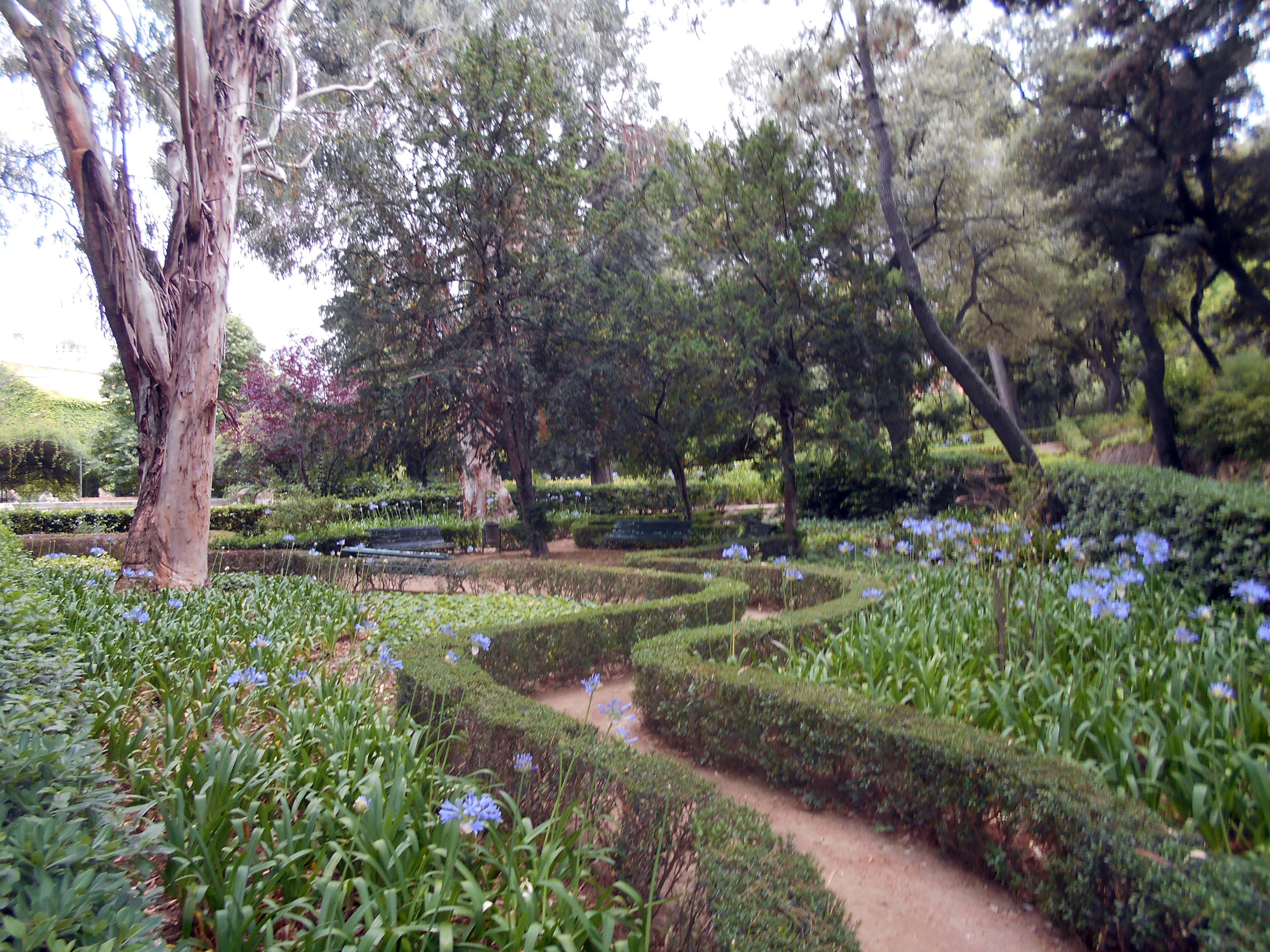 Jardín de las flores.